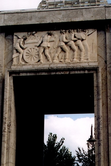 monumento